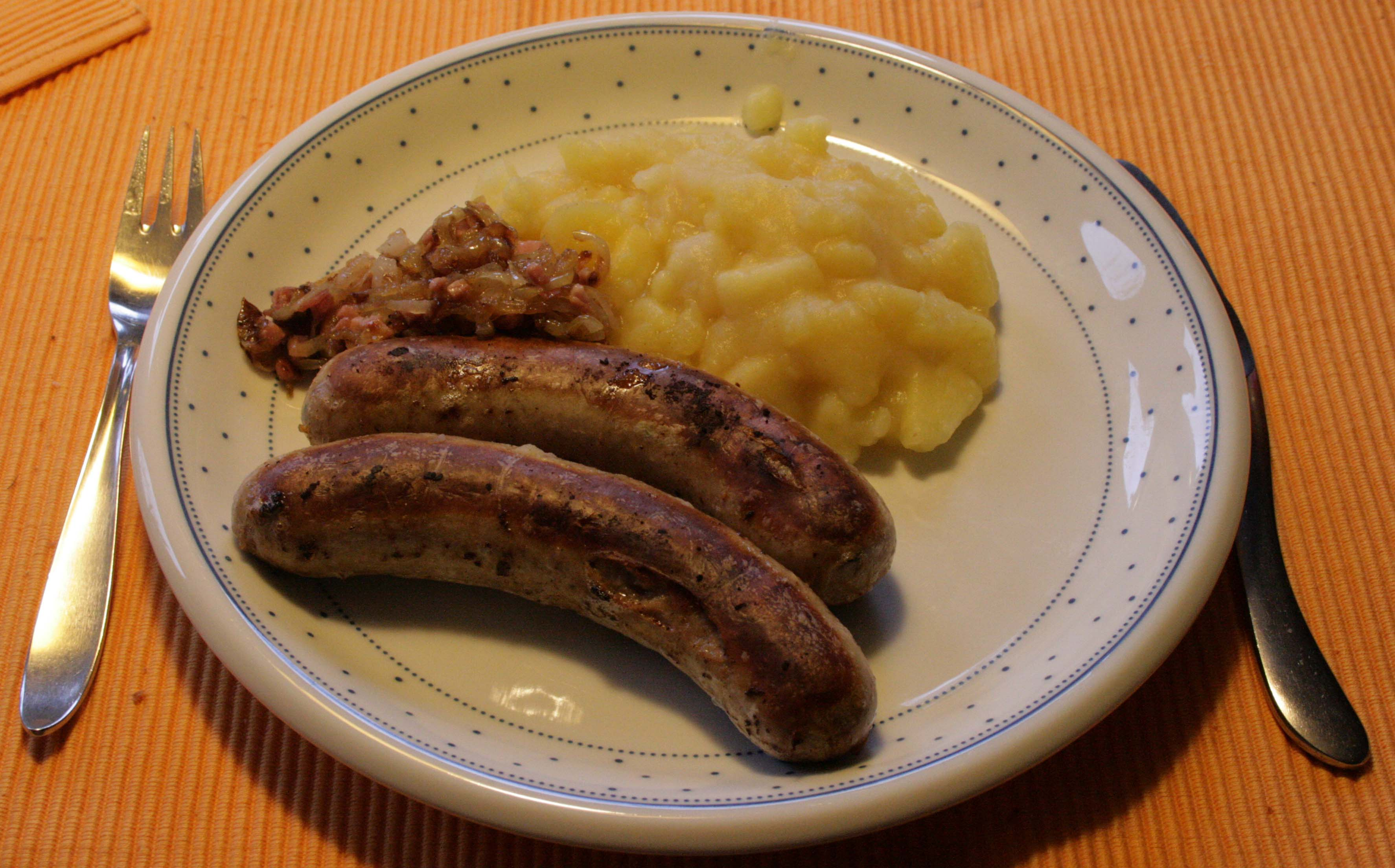 Westfälische Himmel und Erde